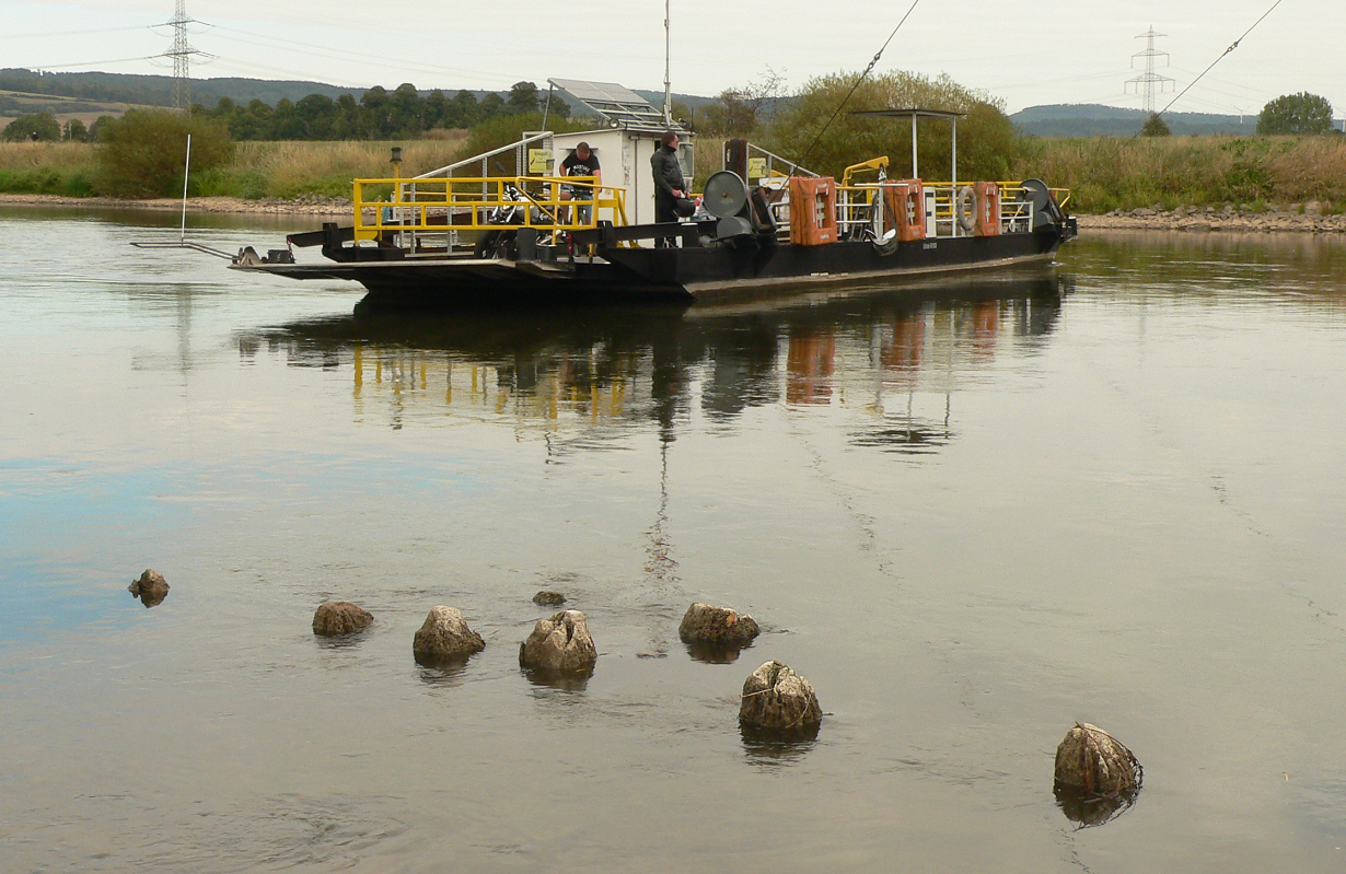 Pfähle der Weserbrücke Grohnde, dahinter die Fähre Grohnde, Blick von der westlichen Flussseite